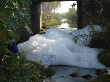 Kali vain in past